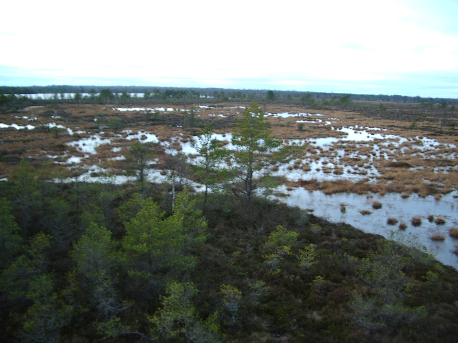 Koigi raba